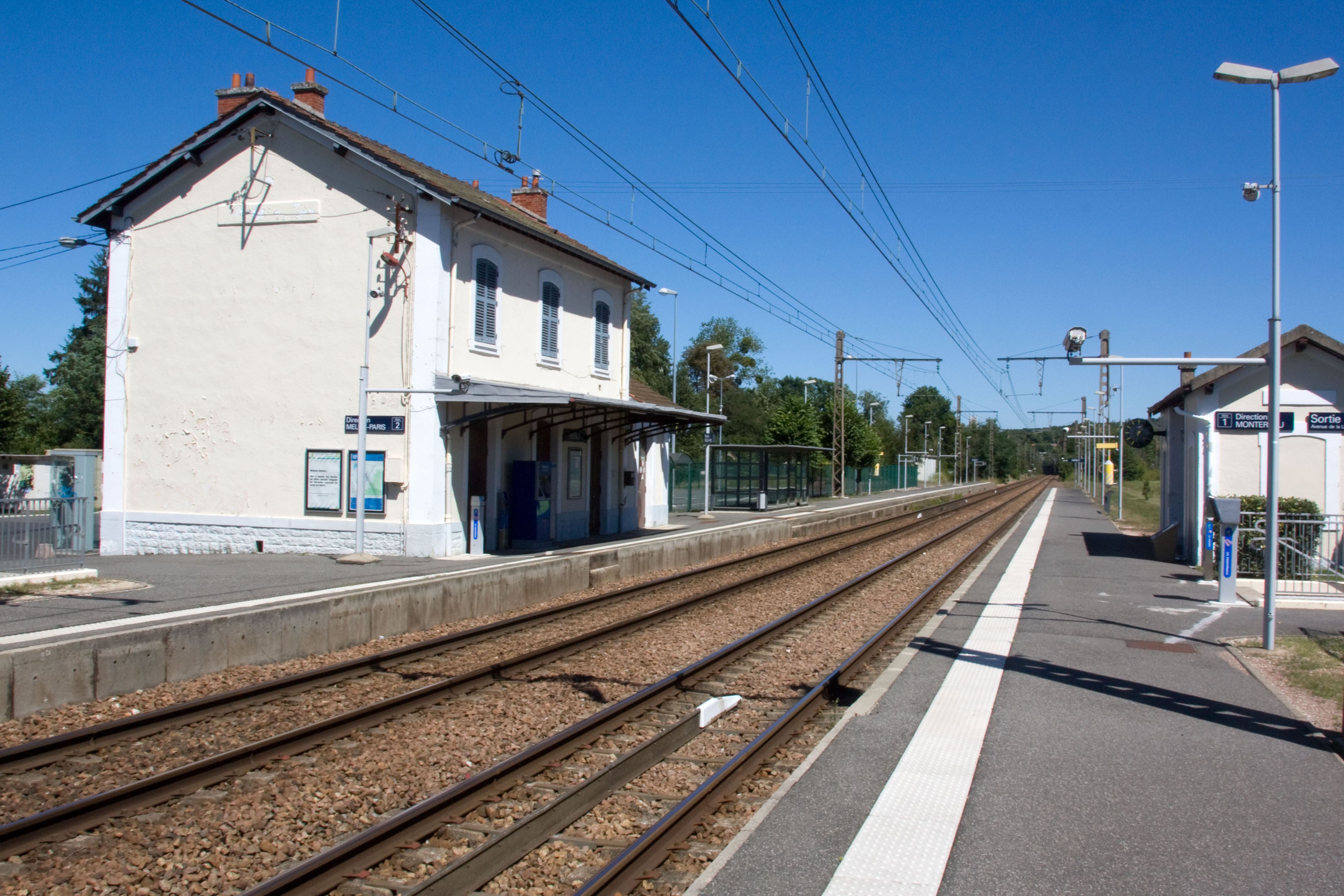 Gare d'Héricy, Héricy, Seine-et-Marne, France